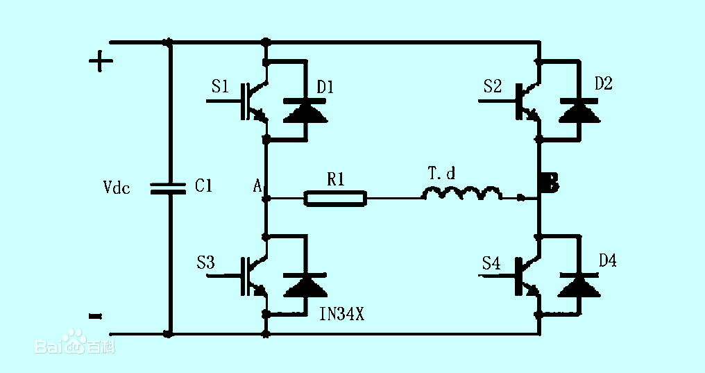 中文（中国大陆）: H桥的工作原理